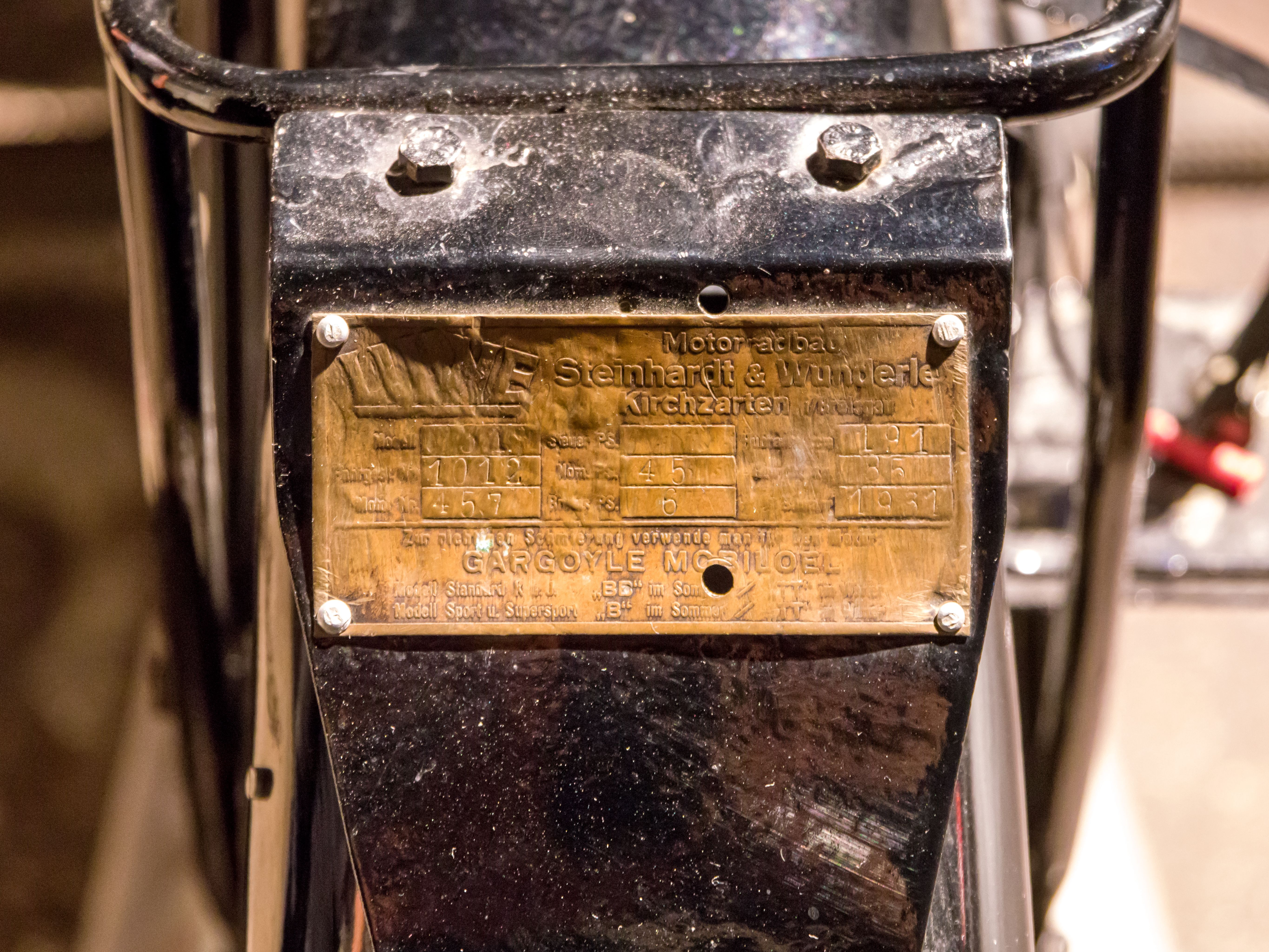 Ein LUWE Motorrad aus dem Jahre 1931, das im Oldtimer Museum Volante in Kirchzarten ausgestellt ist.. Es ist eins der späteren Modelle, die bei der Firma Wunderle in Kirchzarten montiert wurden.